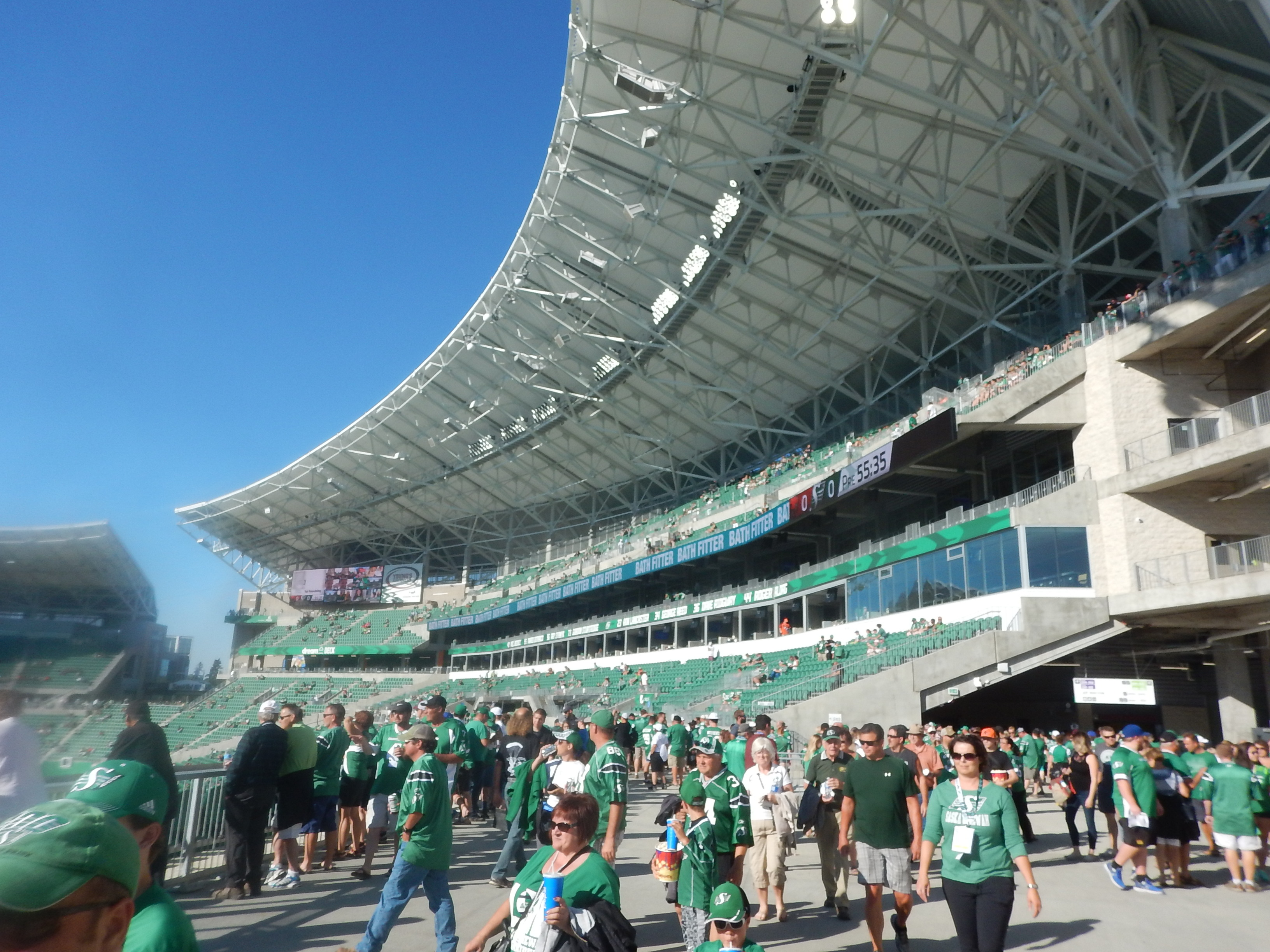 2017 08 12a Rider BC Game 51